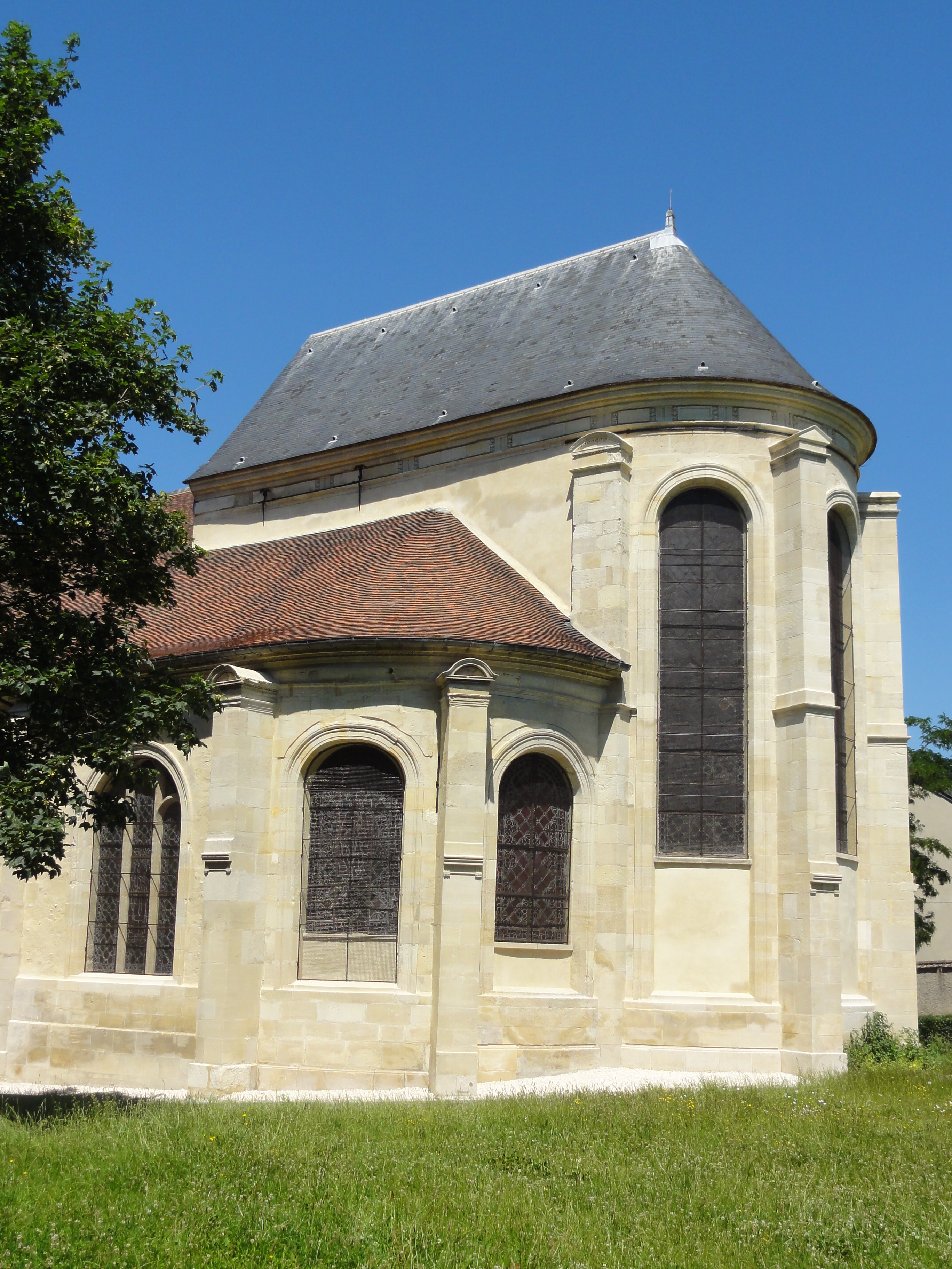 Chœur, vue depuis le sud-est.